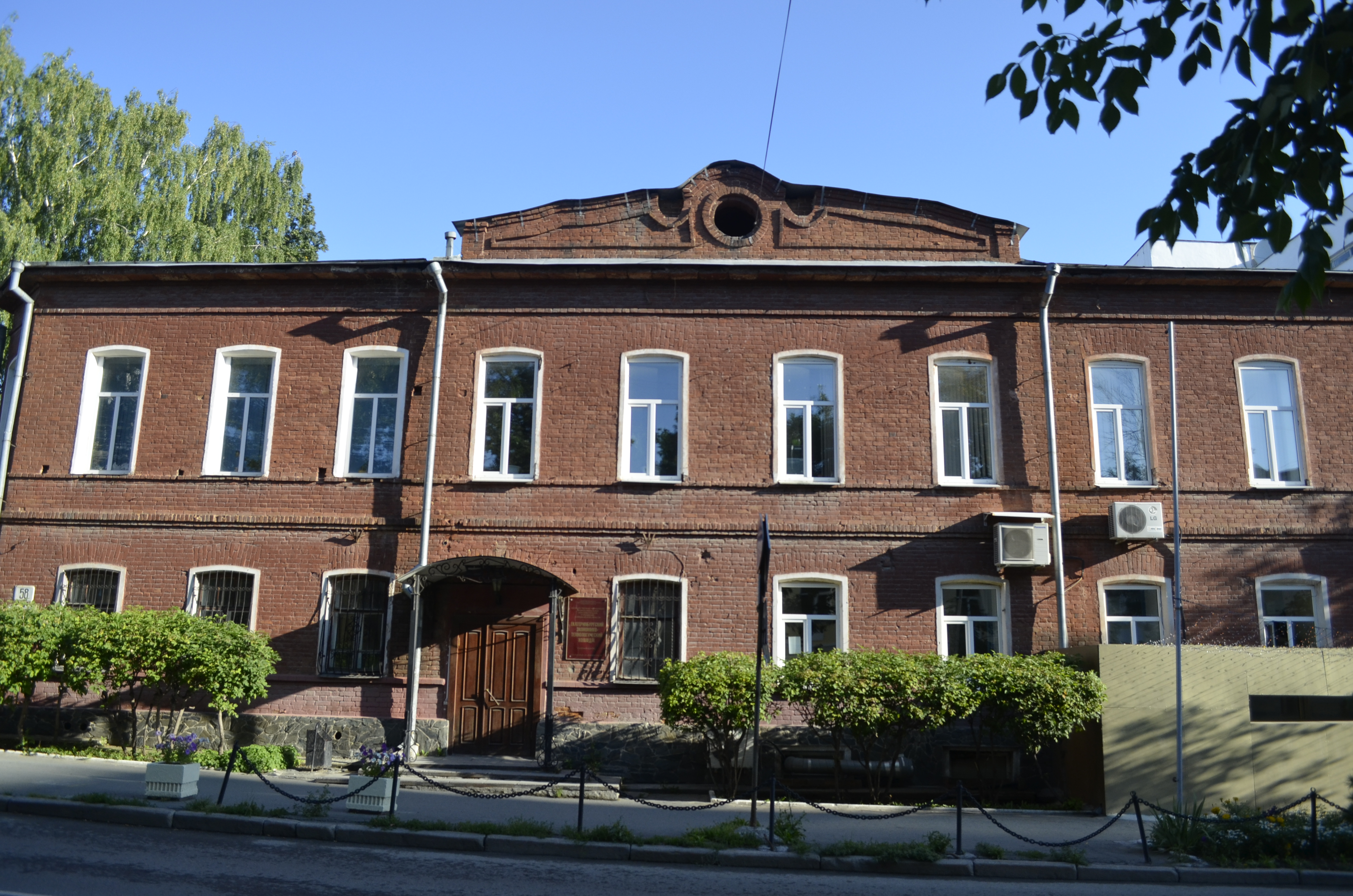 Здание, где в лесотехническом институте работал ученый-лесовод К.С.Семенов: улица Декабристов, 58, Екатеринбург, Свердловская область